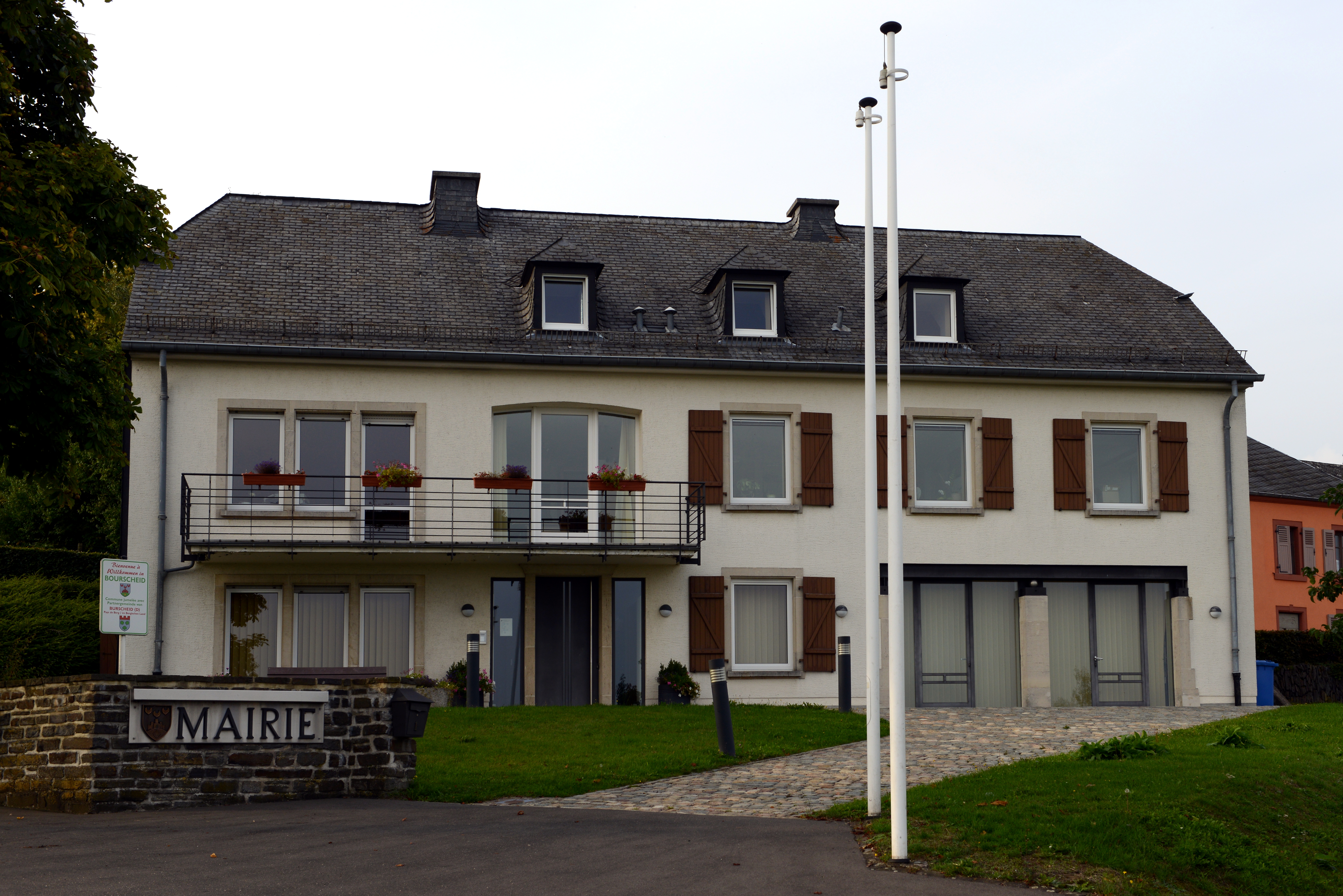 D'Märei zu Buerschent.